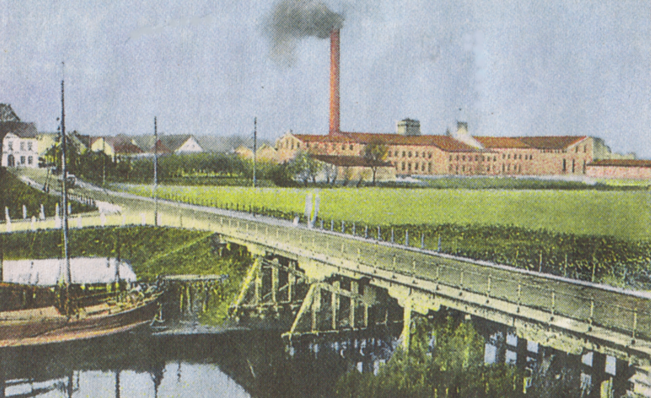 Der Die Pinnaubrücke (Hohe Brücke) in Uetersen,im Hintergrund die Papierfabrik, später Feldmühle und dann StoraEnso, Postkarte gelaufen 1907.